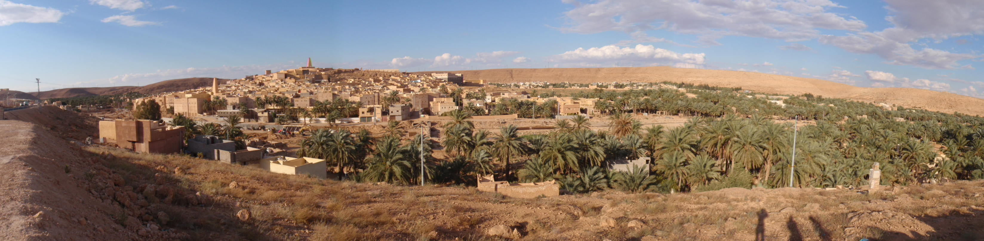 Ghardaia avec panorama de la vallée du Mzab.